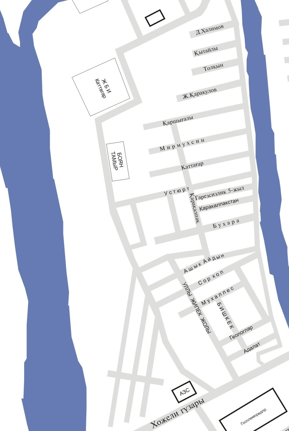 Пристанский Нукус